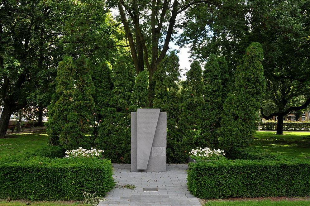 Kunstenaar L.H. Timmerman-Papenhuijzen. Tekst: Loek Elfferich Onthulling 4 mei 1988 Tekst op het monument: In de woning Statenweg 147 werd op 14 mei 1940 het Duitse ultimatum overhandigd: Geef U over of Uw stad wordt vernietigd. Rotterdam werd grotendeels vernietigd. Honderden verloren hun leven, duizenden hun huis, hun bestaan, het hart van hun stad. Vervolging, terreur, roof en honger volgden. Maar ook direct: verzet. Vijf jaren later kwam de bevrijding. Voorbijganger, U staat waar Nederland werd gezet voor dreiging met vernietiging van Rotterdam en van andere steden. Toen die dreiging werd uitgevoerd gaf Nederland zich over. Erasmus zei in 1517: ‘De onrechtvaardigste vrede is beter dan de rechtvaardigste oorlog’.